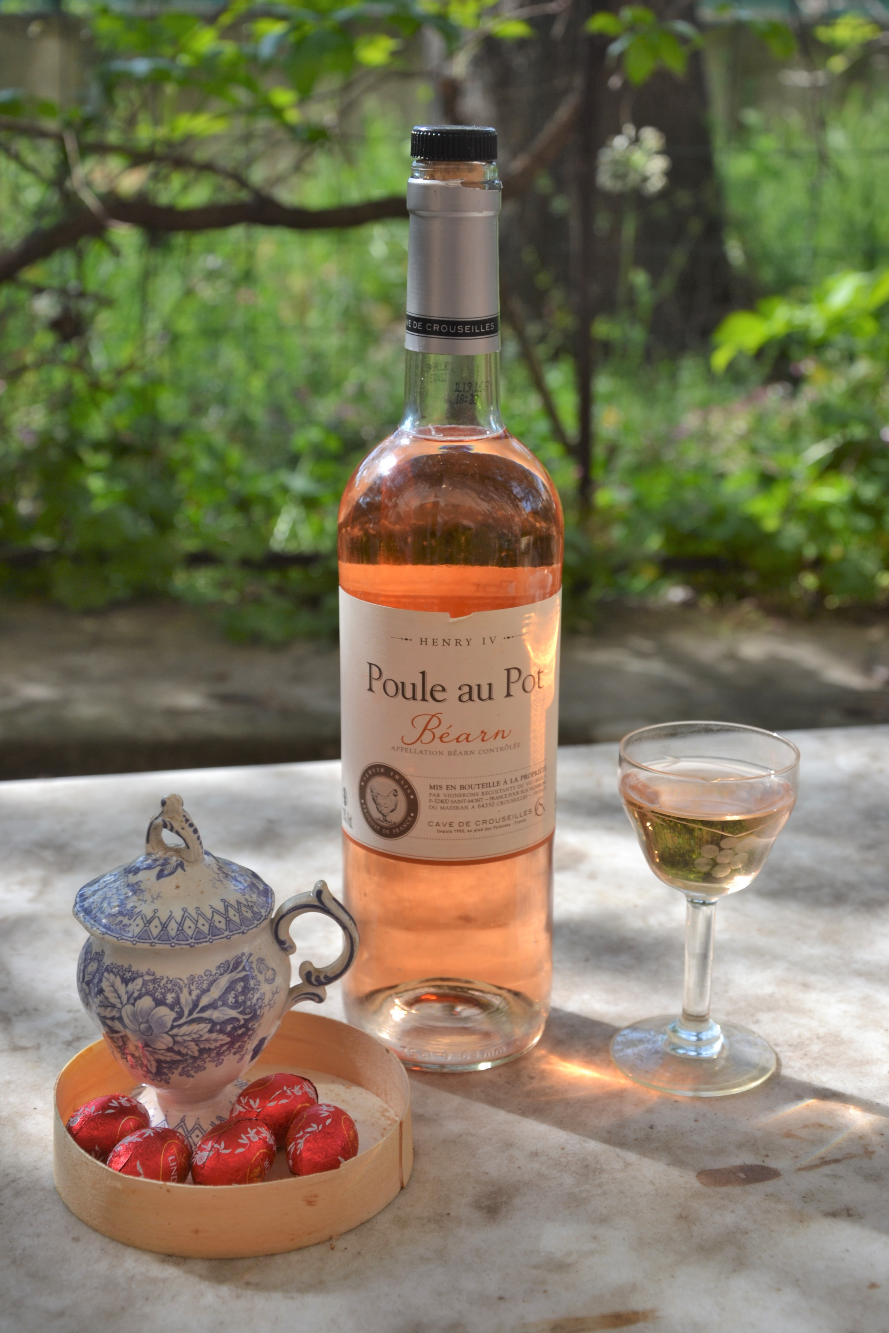 rosé du Béarn en l'honneur d'Henri IV